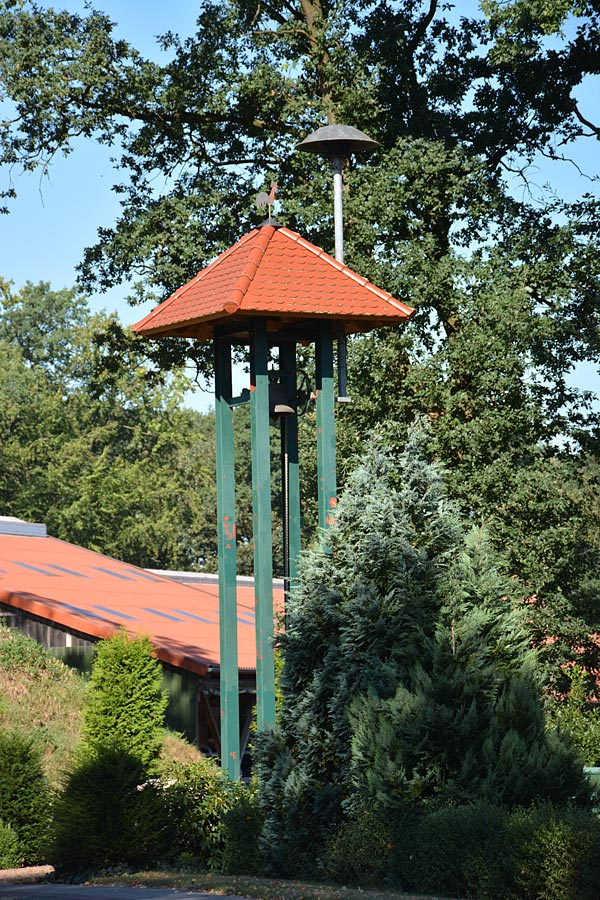 Brauel Glockenturm